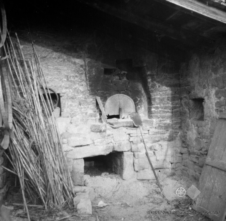 Pogled na peč za peko kruha, Prade.